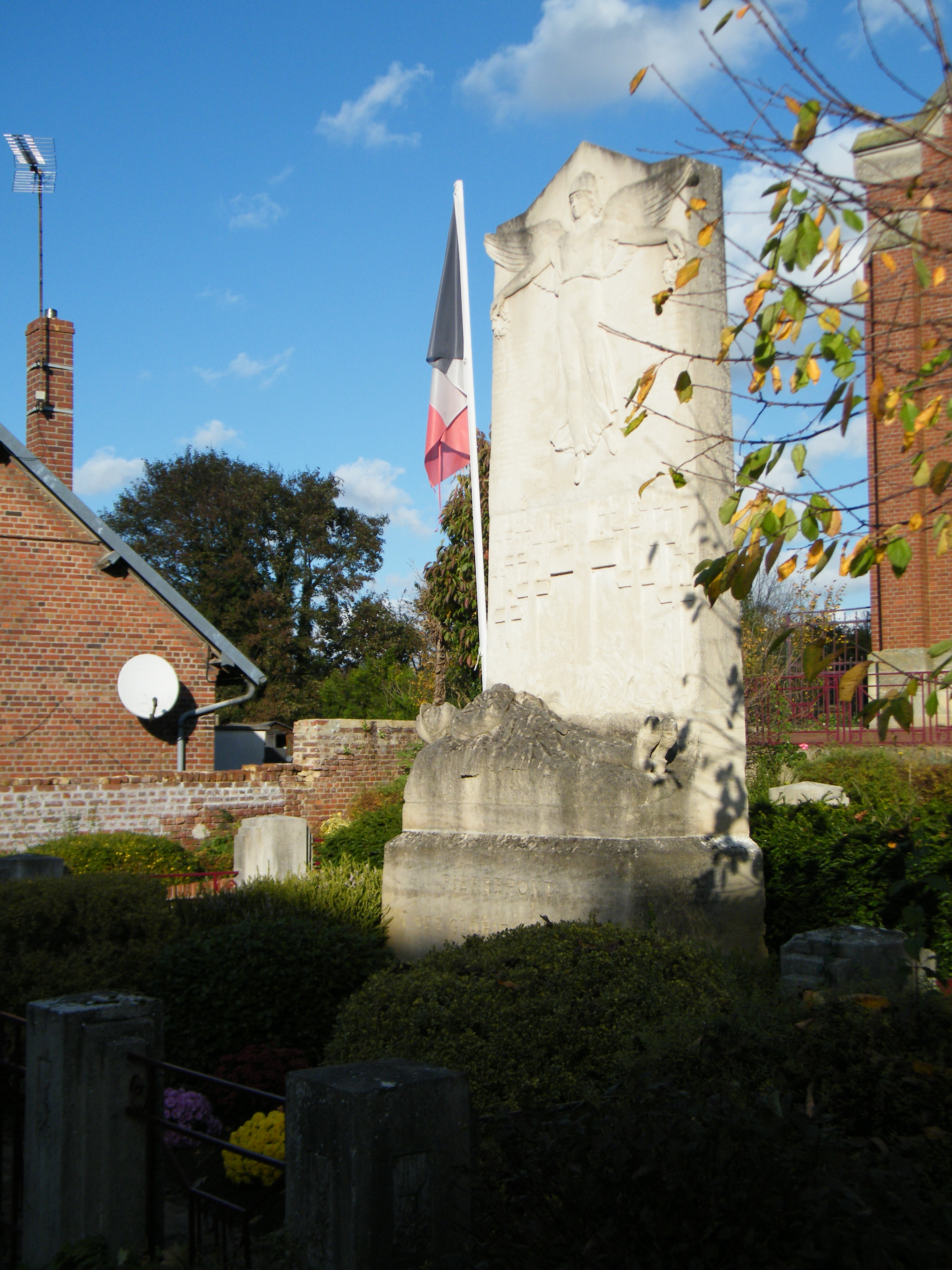 Monument aux morts pour la patrie, sculpture de Pourquet.